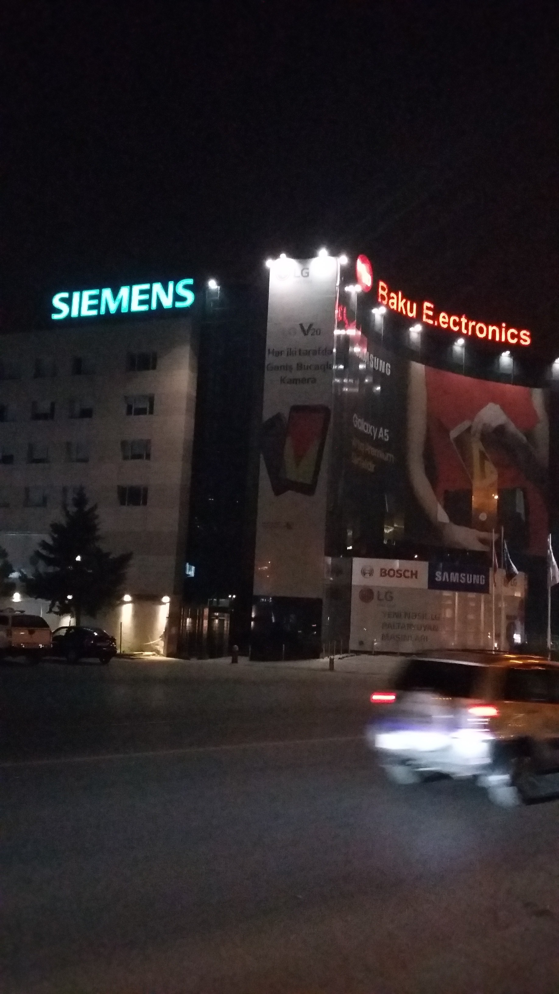 SIEMENS Baku